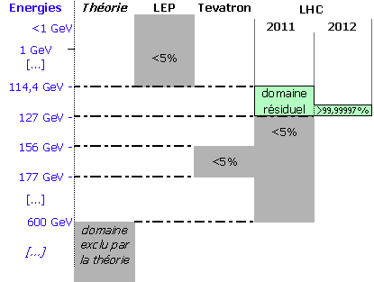 Domaines d'exclusion de l'énergie propre du boson de Higgs fin 2011